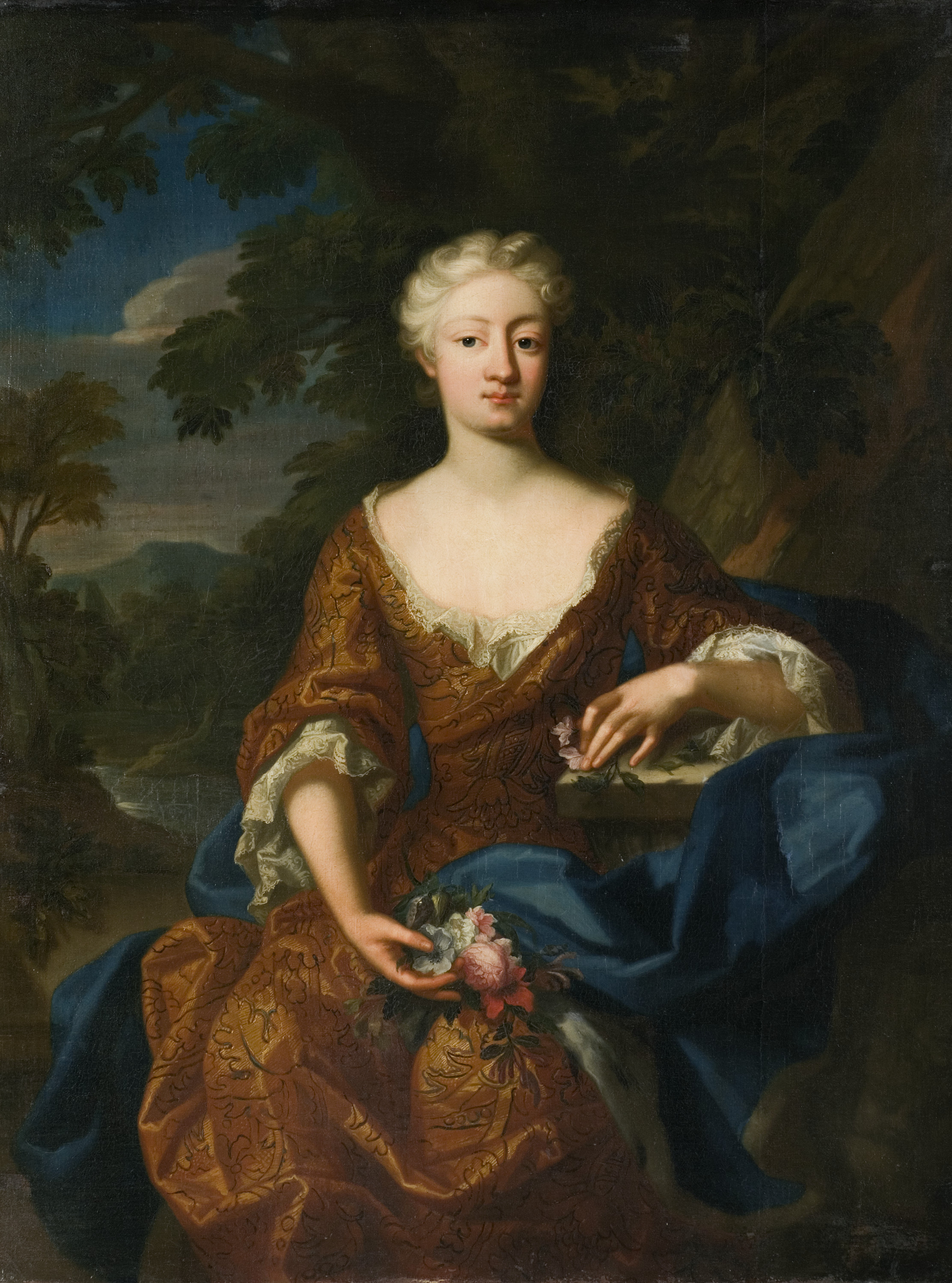 Replik